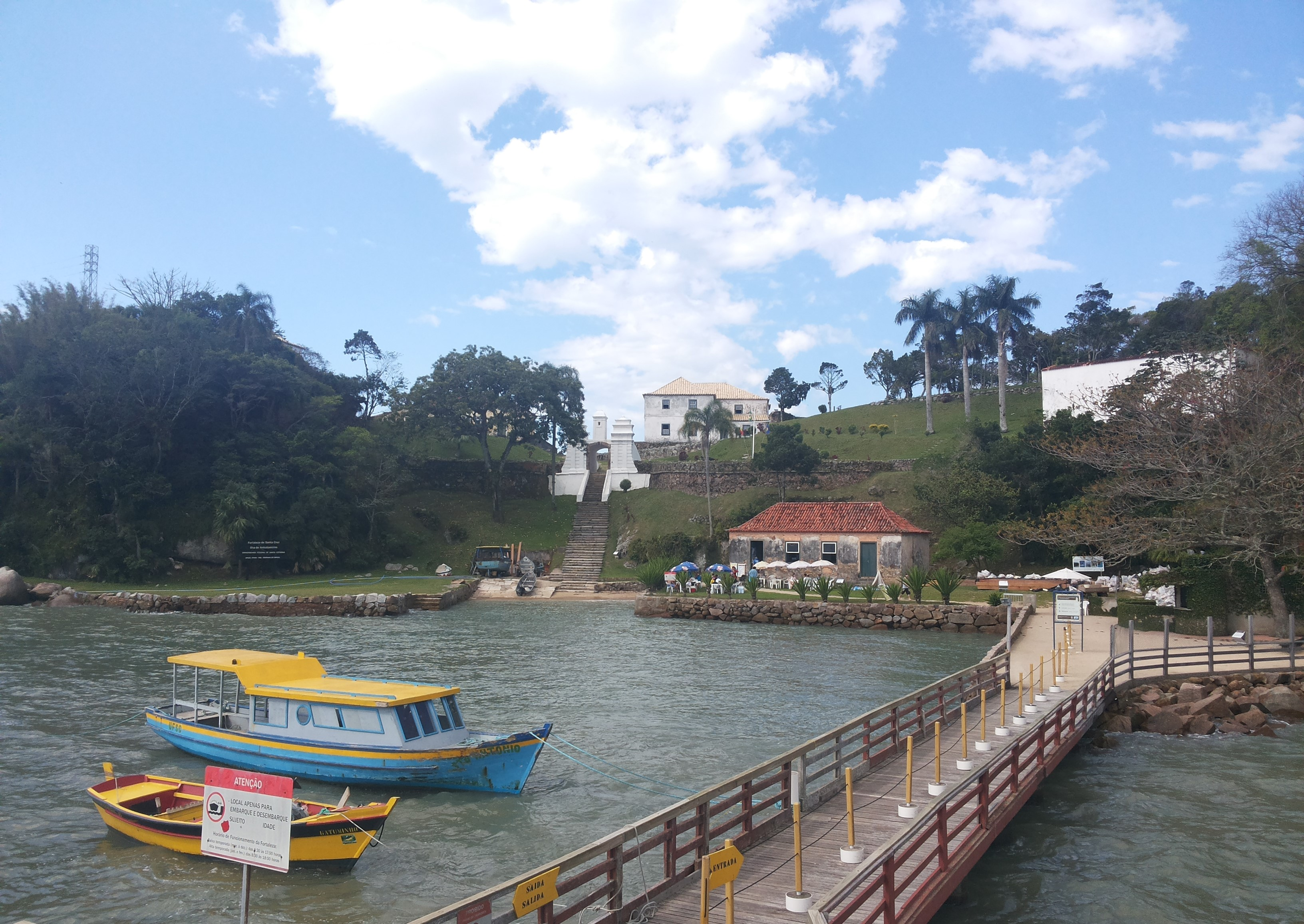 Fortaleza de Santa Cruz localizada na Ilha de Anhatomirim, no município de Celso Ramos.